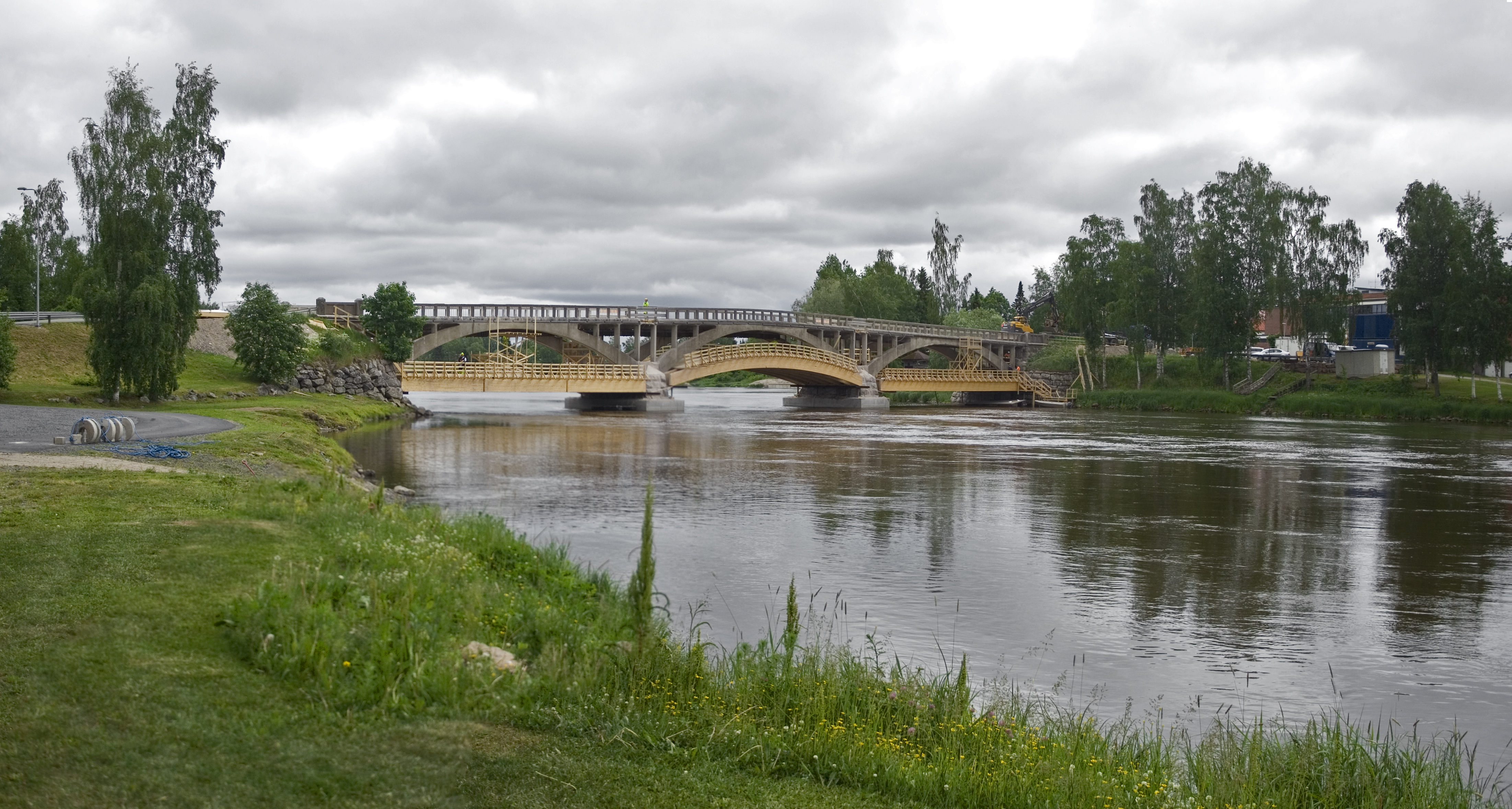 Tulkkilan silta korjauksessa 2014